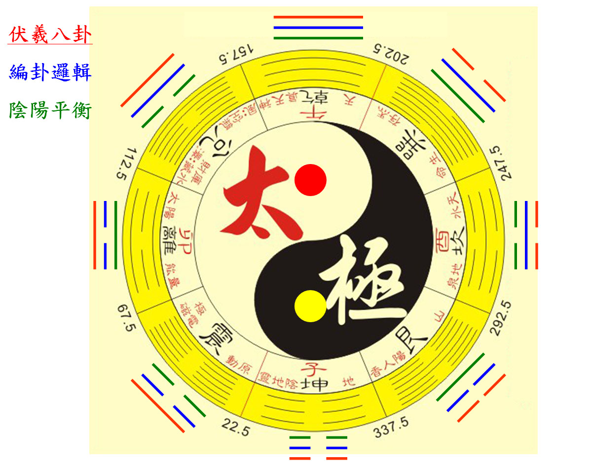 八卦太極圖